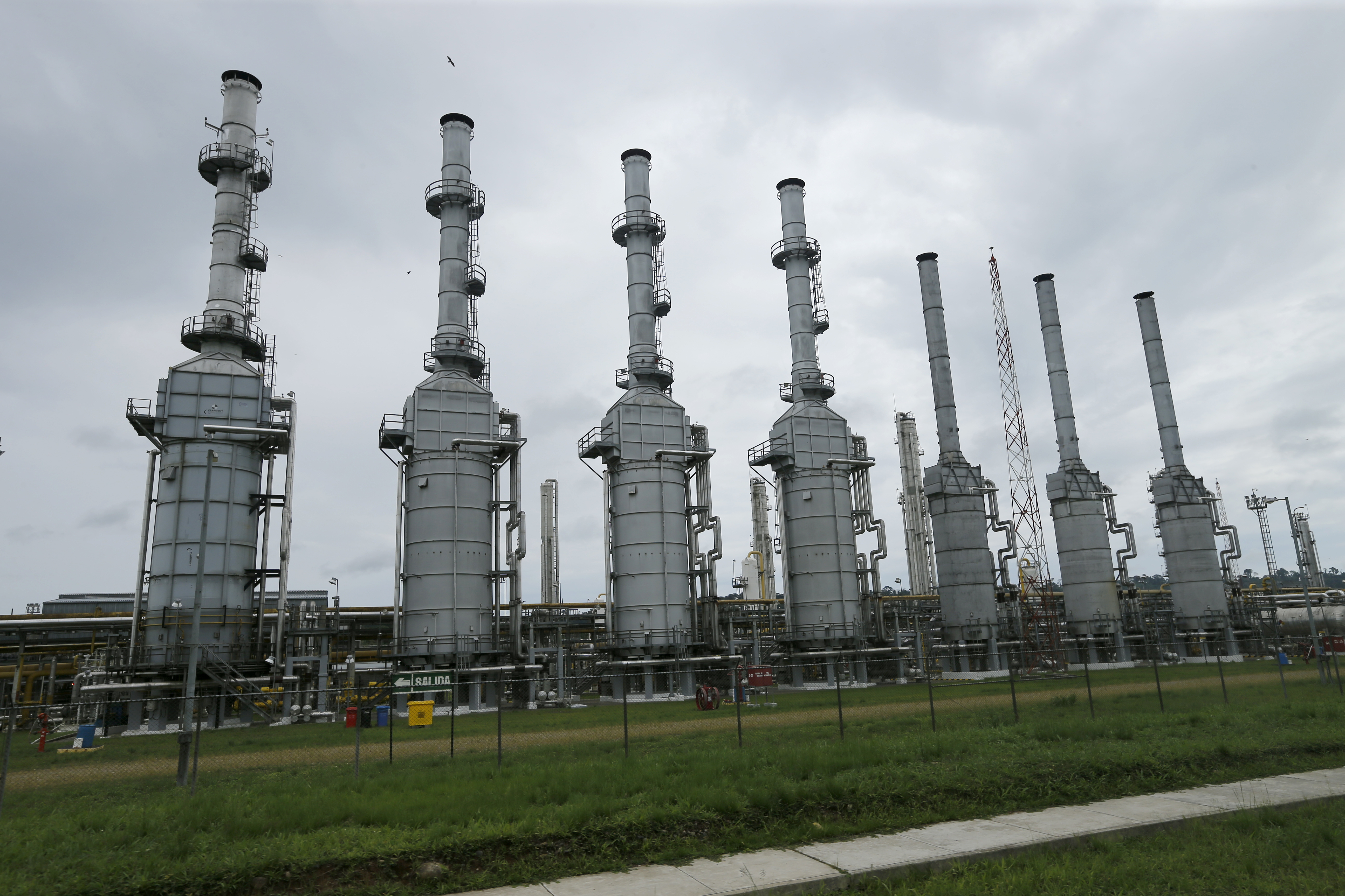 El Ministro de Defensa, Jakke Valakivi, acompañado por el Jefe del Comando Conjunto de las Fuerzas Armadas, Almirante Jorge Moscoso, visitó el eje energético de La Convención en Cusco. En su recorrido supervisó el buen funcionamiento de la planta Malvinas del Consorcio Camisea, la Base Logística Ticumpinia del Gasoducto Sur Peruano S.A. y la Base Transportadora Gas Perú (TGP) en Kiteni, donde las Fuerzas Armadas guardan celosamente la seguridad del desarrollo energético de la Nación.